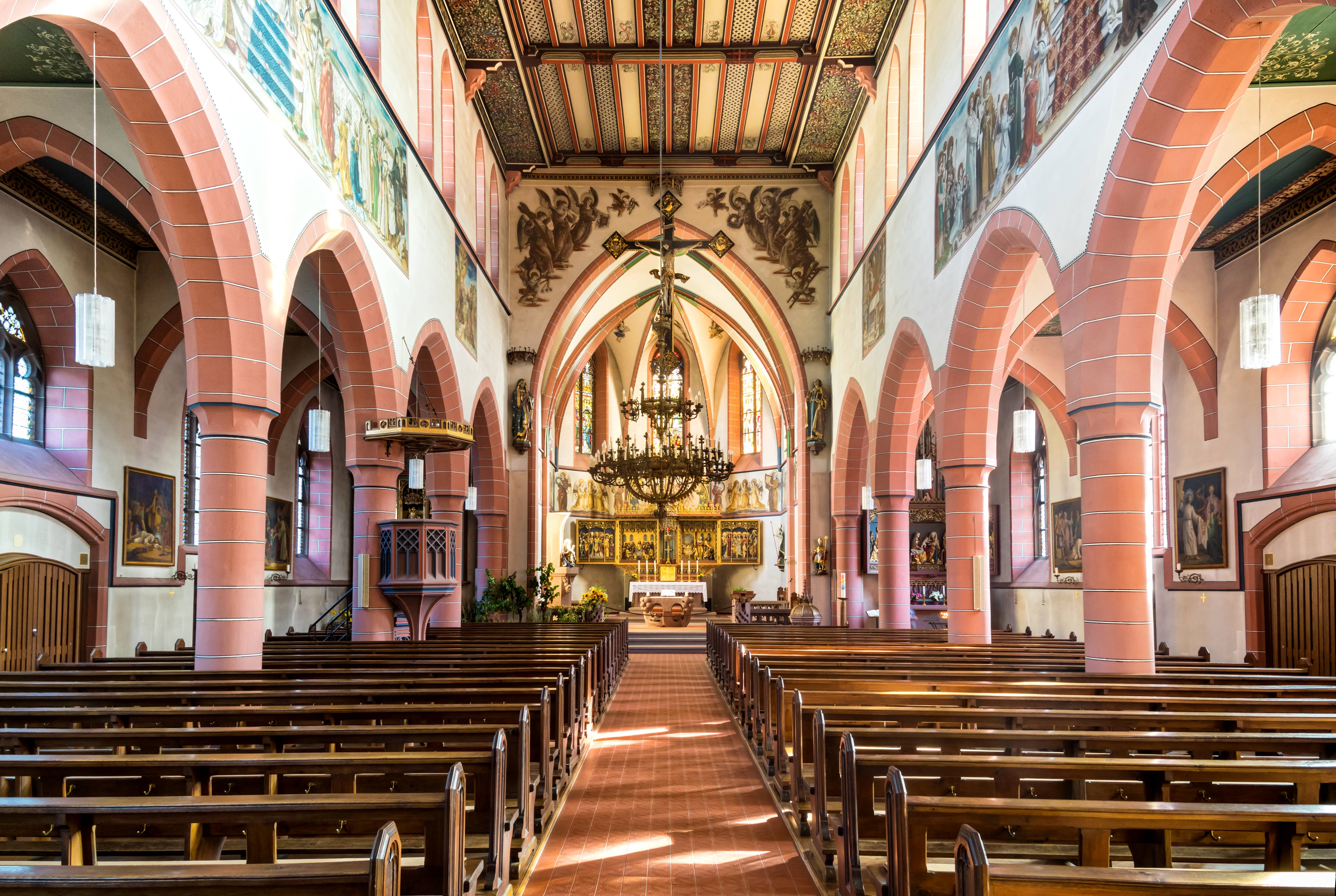 Die katholische Kirche St. Blasius im Glottertal Blick zum Altar